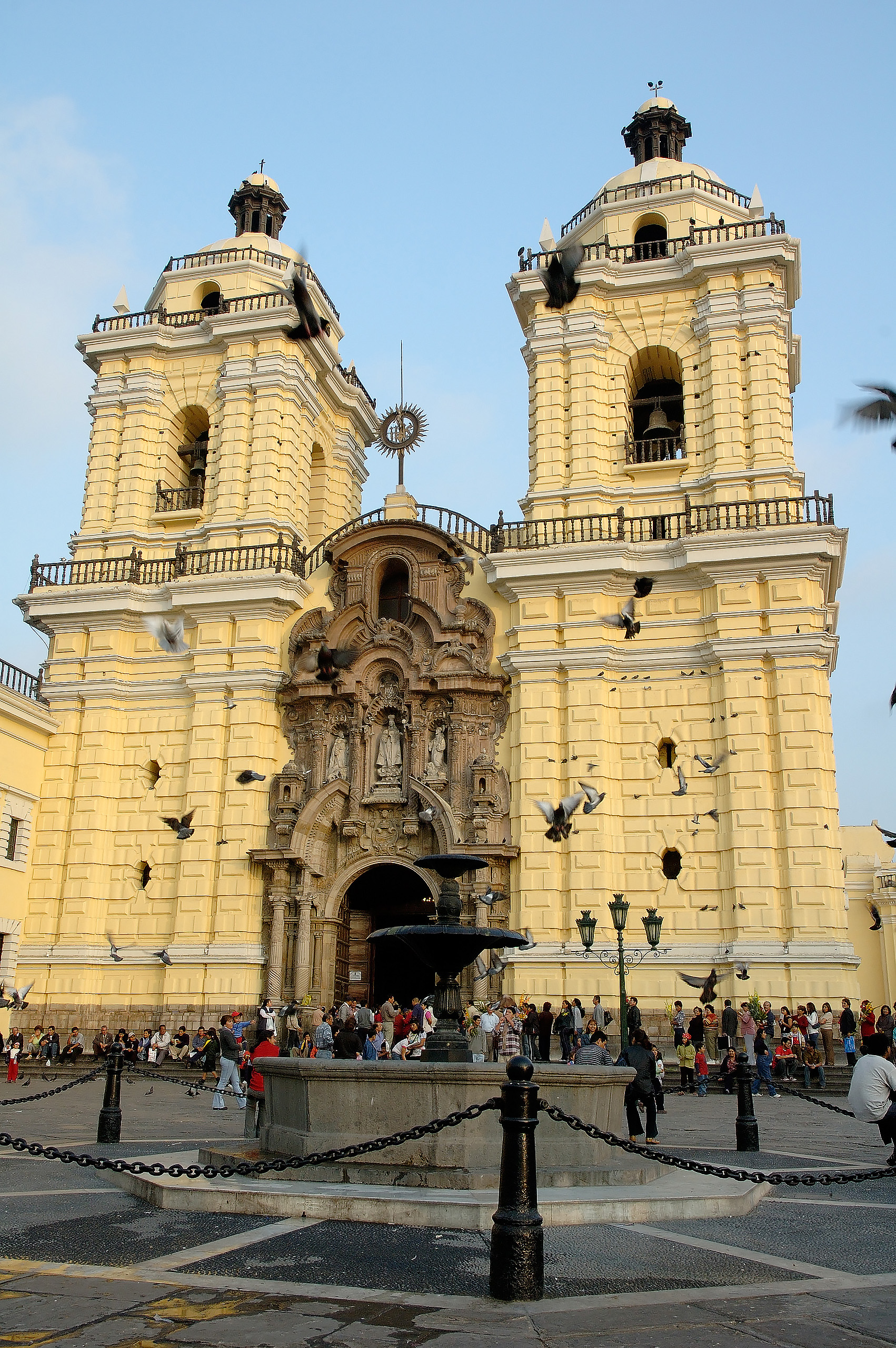 San Francisco de Lima, Peru.